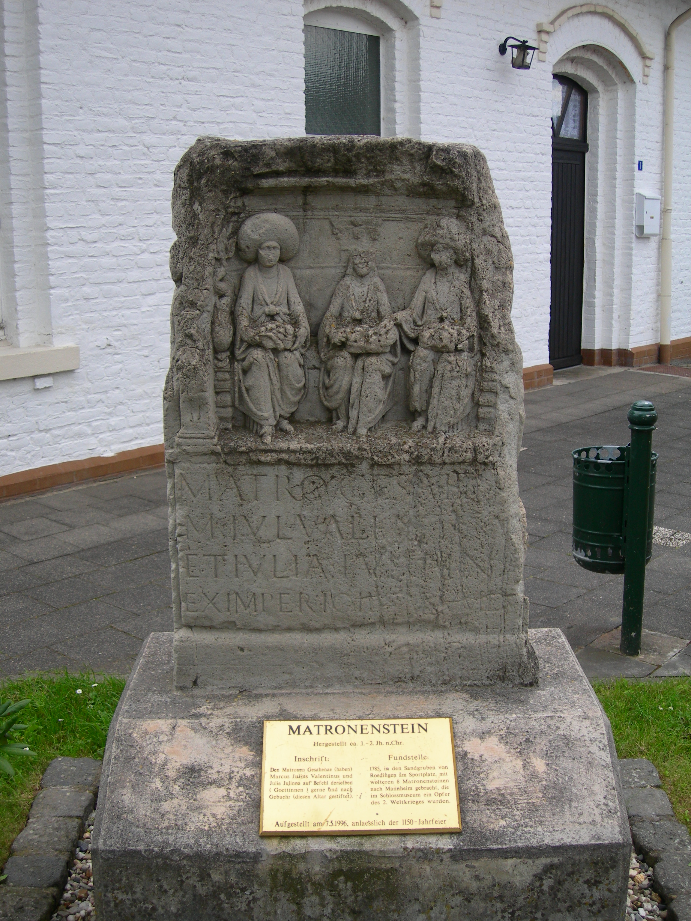 Matronensteine in Rödingen CIL XIII, 7889